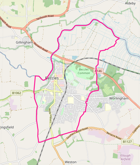 carte réalisée sur umap. This map may be incomplete, and may contain errors. Don't rely solely on it for navigation.